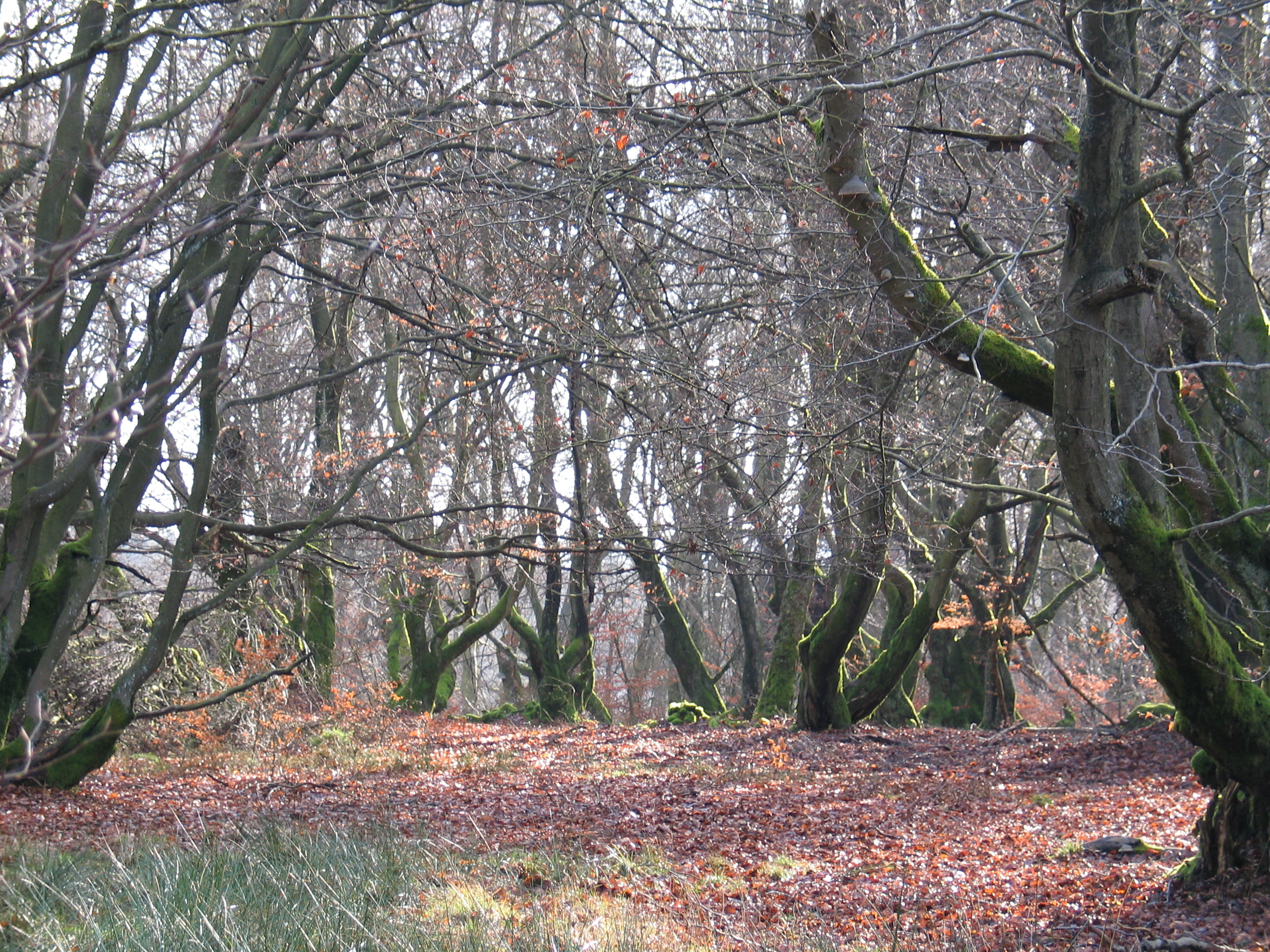 Forêt de hêtres, d'aspect montagnards, situés sur le territoire du camp militaire d'Elsenborn Site classé le 16/10/1948